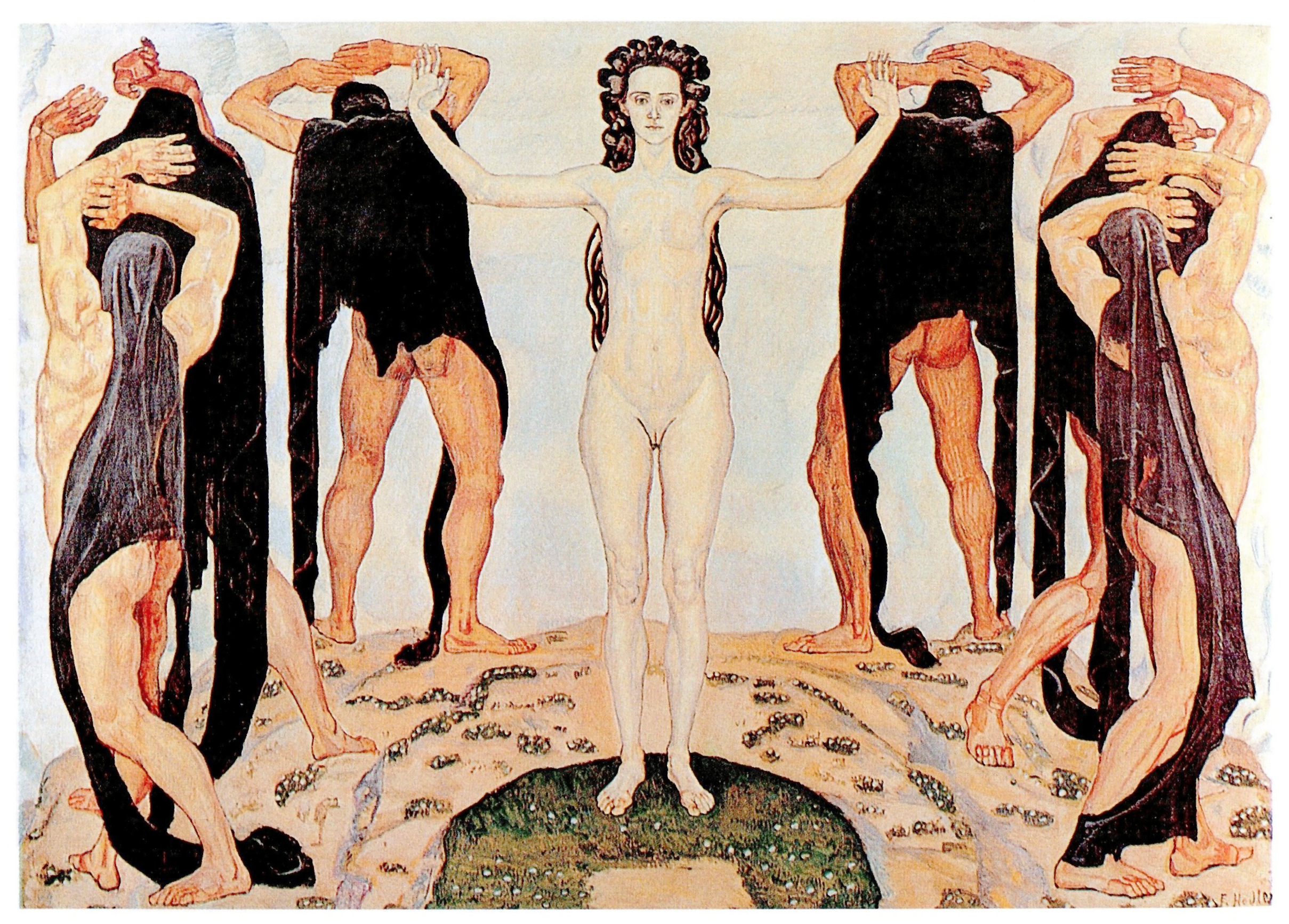 Правда (Die Wahrheit ( de.) в трактовке художника - символиста Фердинанда Ходлера (1903) Это скан из книги: Michael Gibson Symbolismus Taschen GmbH 2006 ISBN 3-8228-5029-2